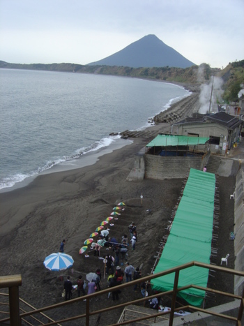 山川温泉と開聞岳